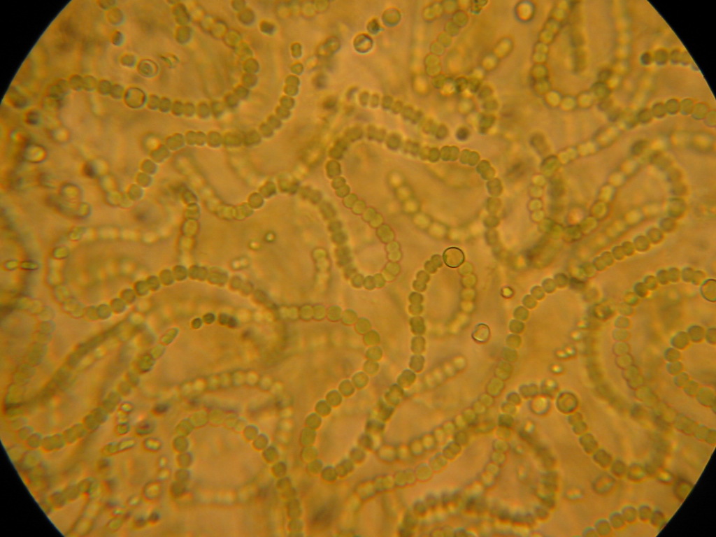 Nostoc au microscope x16x40 (hétérocystes visibles)